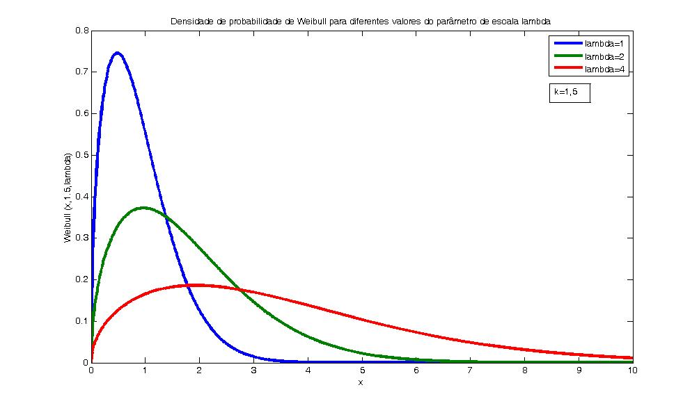 grafico da distribuição de weibull para diferentes parametros de escala e parametro de forma constante igual a 1.5